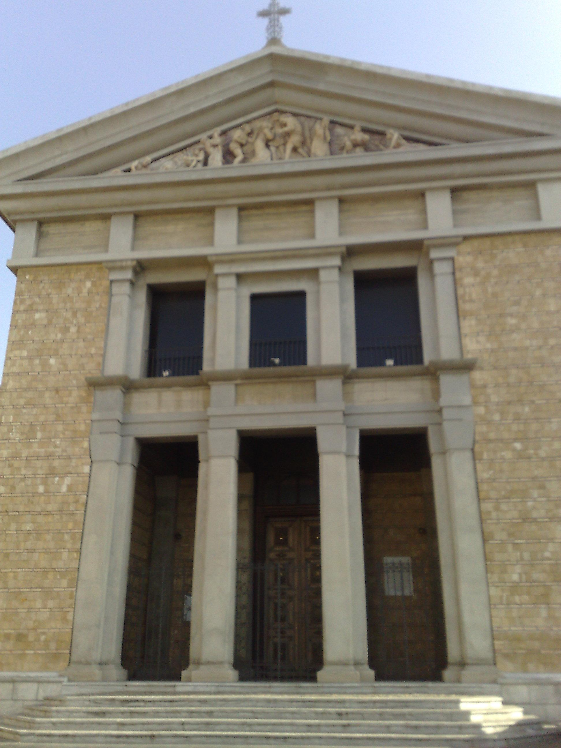 Scilla